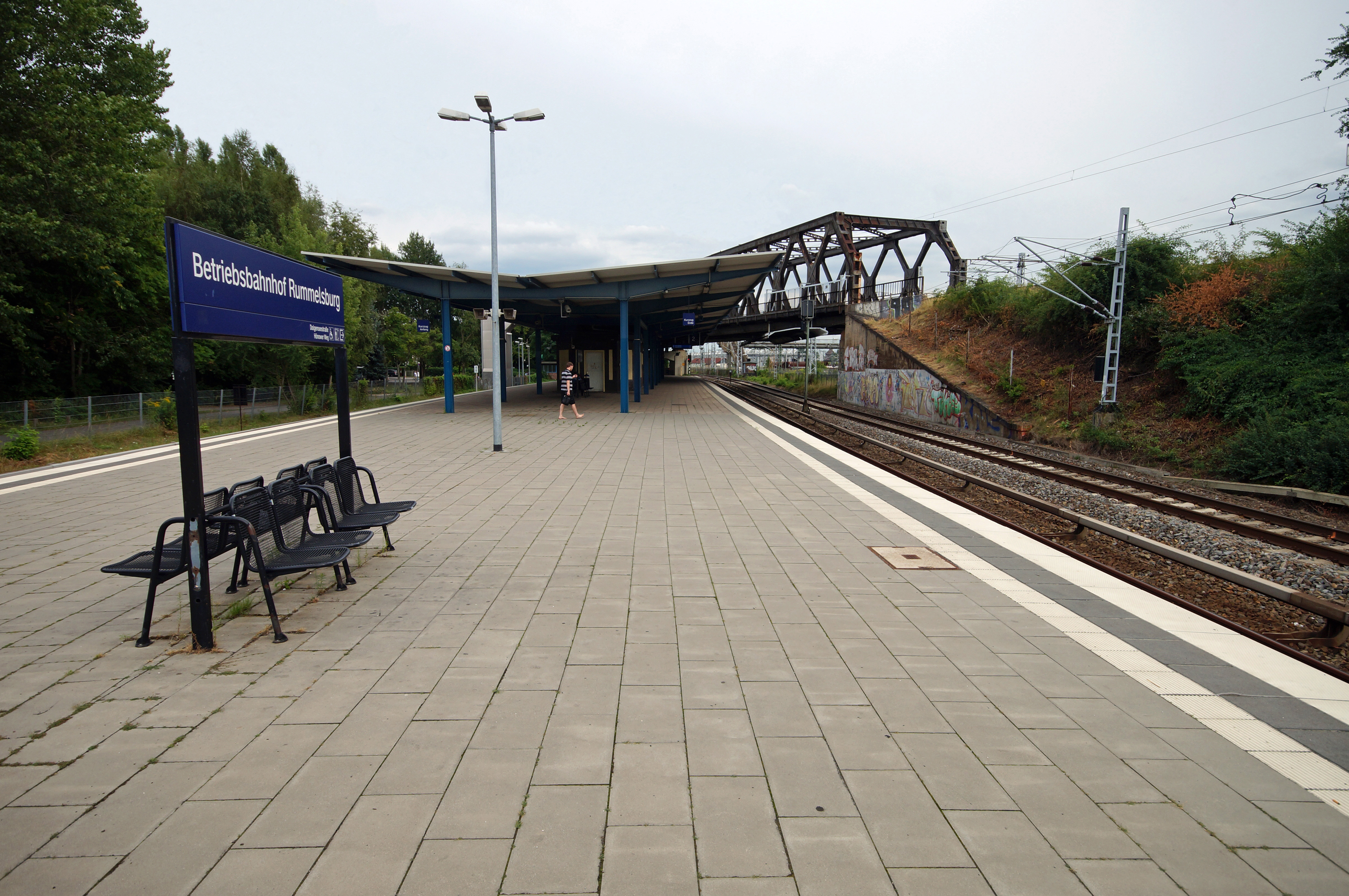 Bahnsteige des Betriebsbahnhofs Rummelsburg in Berlin-Rummelsburg